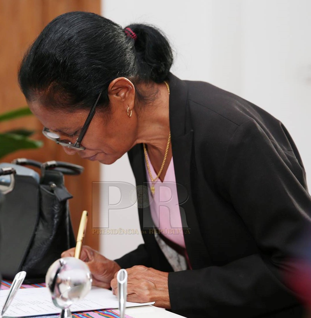 Cristina Alves da Silva beim Konsellu Superior Defeza no Seguransa